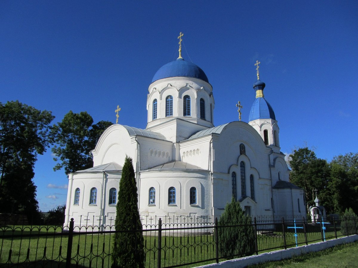 Петрыкаў. Мікалаеўская царква